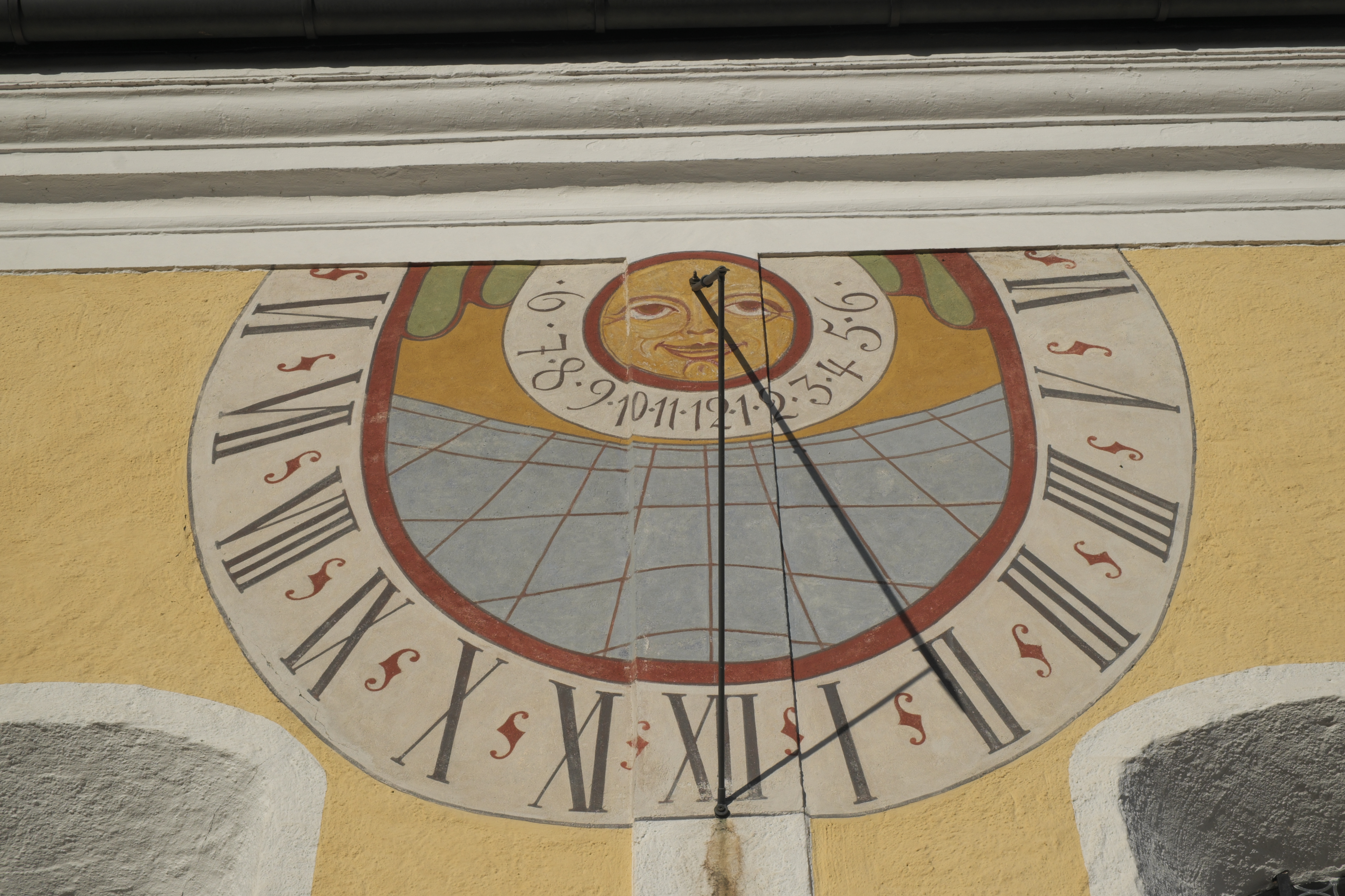 Katholische Pfarrkirche St. Laurentius in Haag an der Amper im Landkreis Freising (Bayern/Deutschland), Sonnenuhr